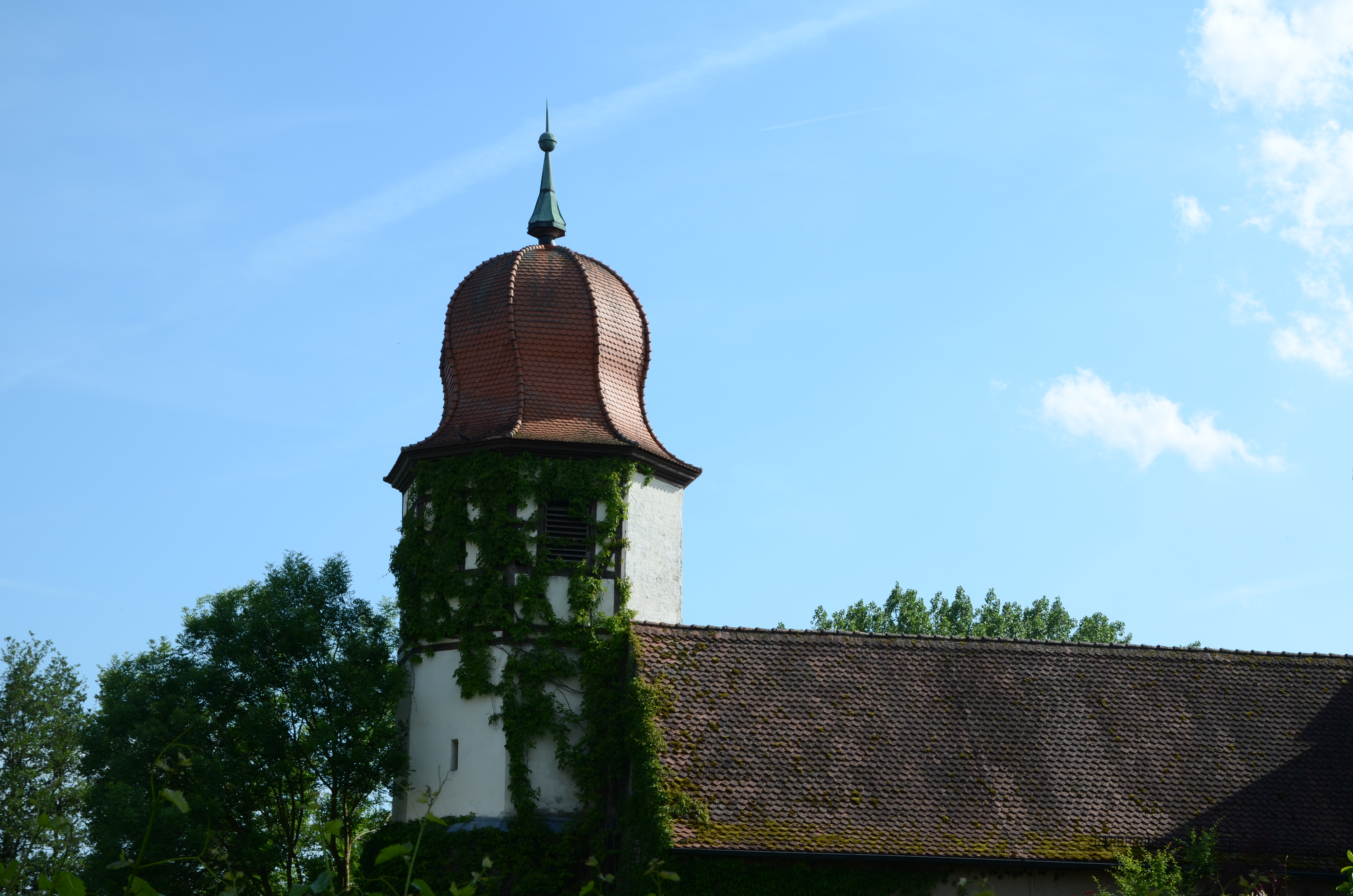 neue Schlosskirche in Sommersdorf, ehemals Zehnstadel